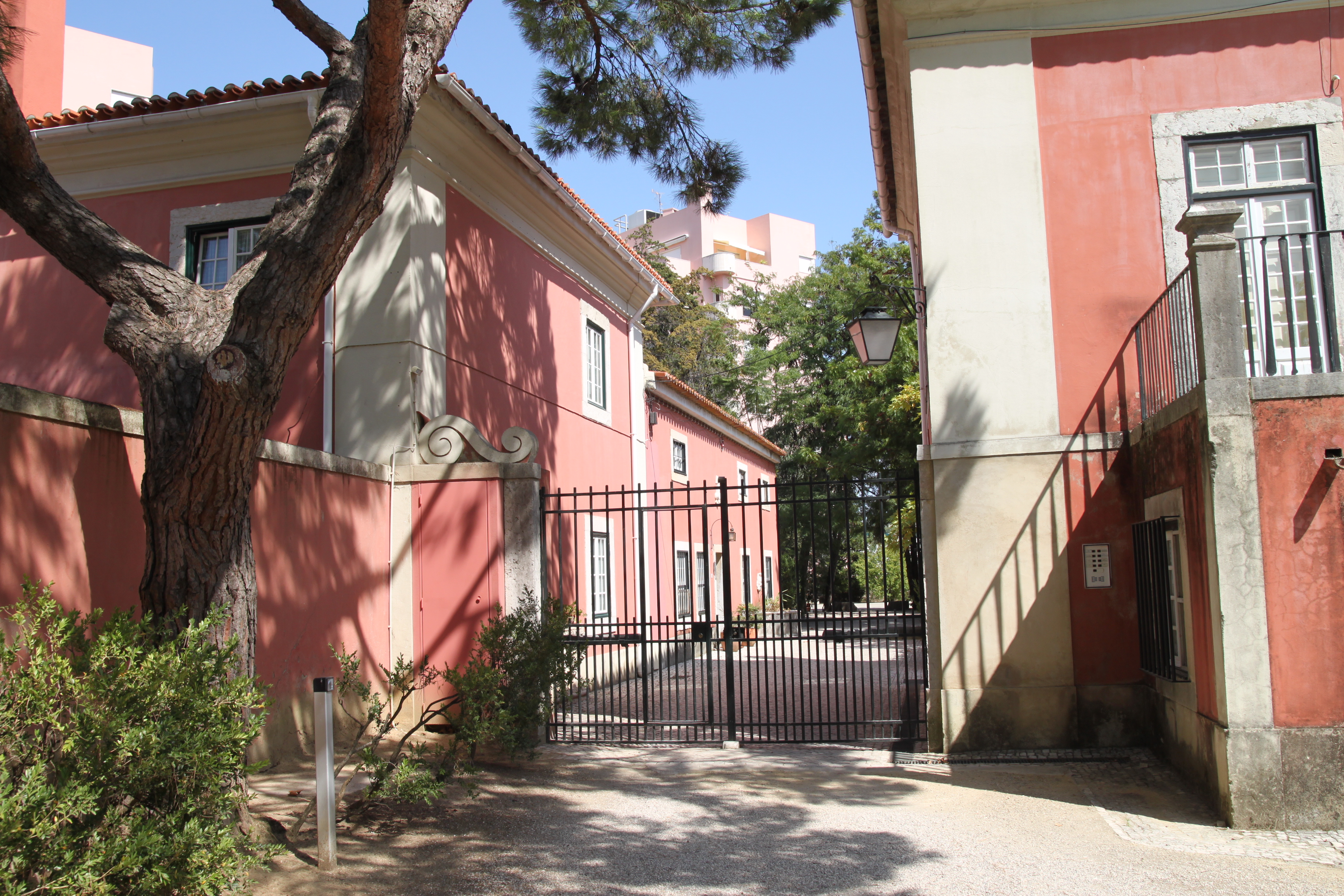 Quinta dos Lagares d'El-Rei This file was uploaded for Wiki Loves Monuments in Portugal with the unique identifier 75032.